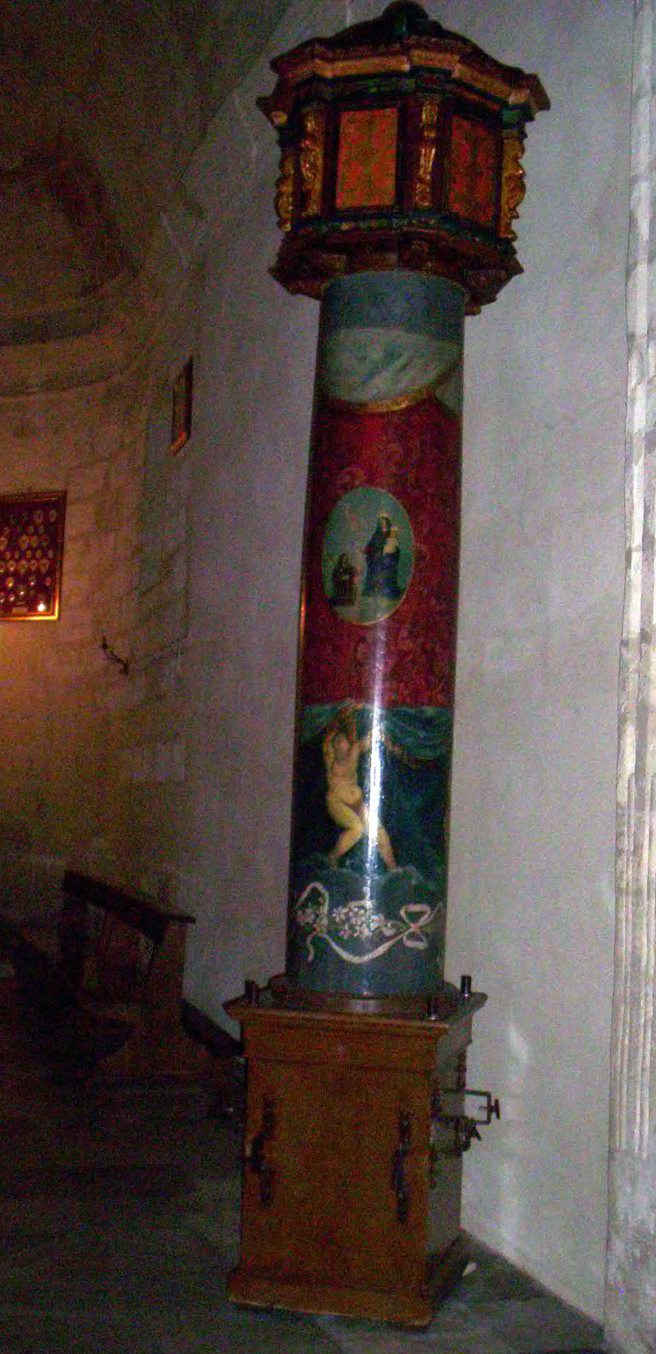 Candeliere dei Viandanti nella sua cappella a S.Agostino, Sassari